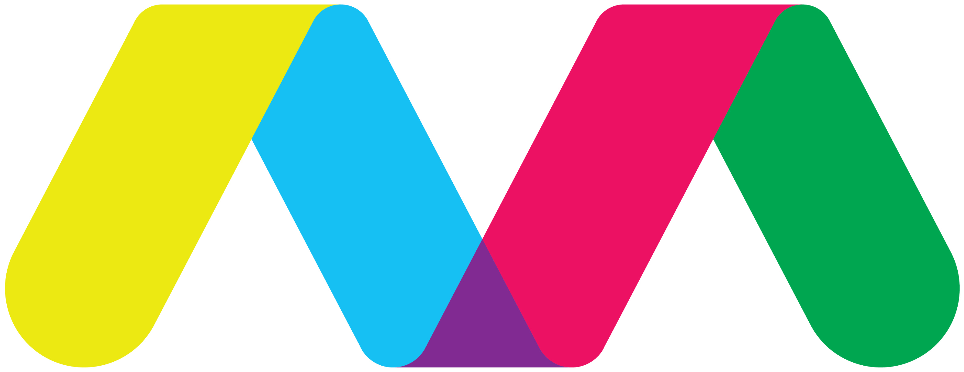 Новый логотип Бакинсокго метрополитена. 2014 год.